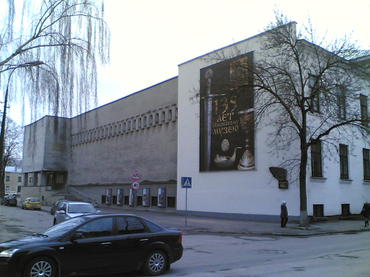 Псковский государственный объединённый историко-архитектурный и художественный музей. Здание картинной галереи на ул. Некрасова, д.7 (главный вход - с Комсомольского переулка)